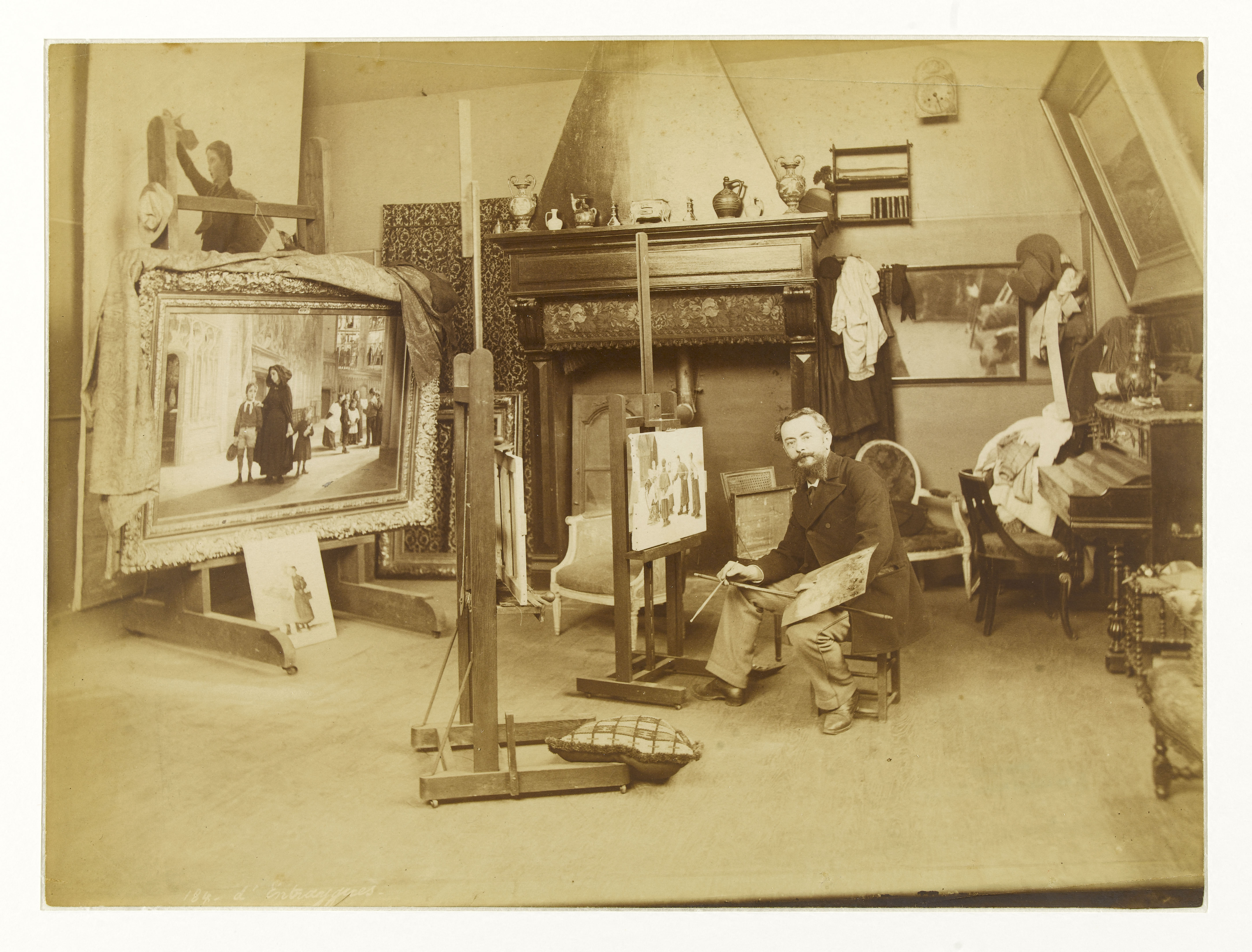 Charles Bertrand d'Entraygues dans son atelier (à Écouen (Val d'Oise), 21 x 28 cm, photographie vers 1900. Collections du Petit Palais, musée des Beaux-arts de la Ville de Paris, Inv : PHDUT36